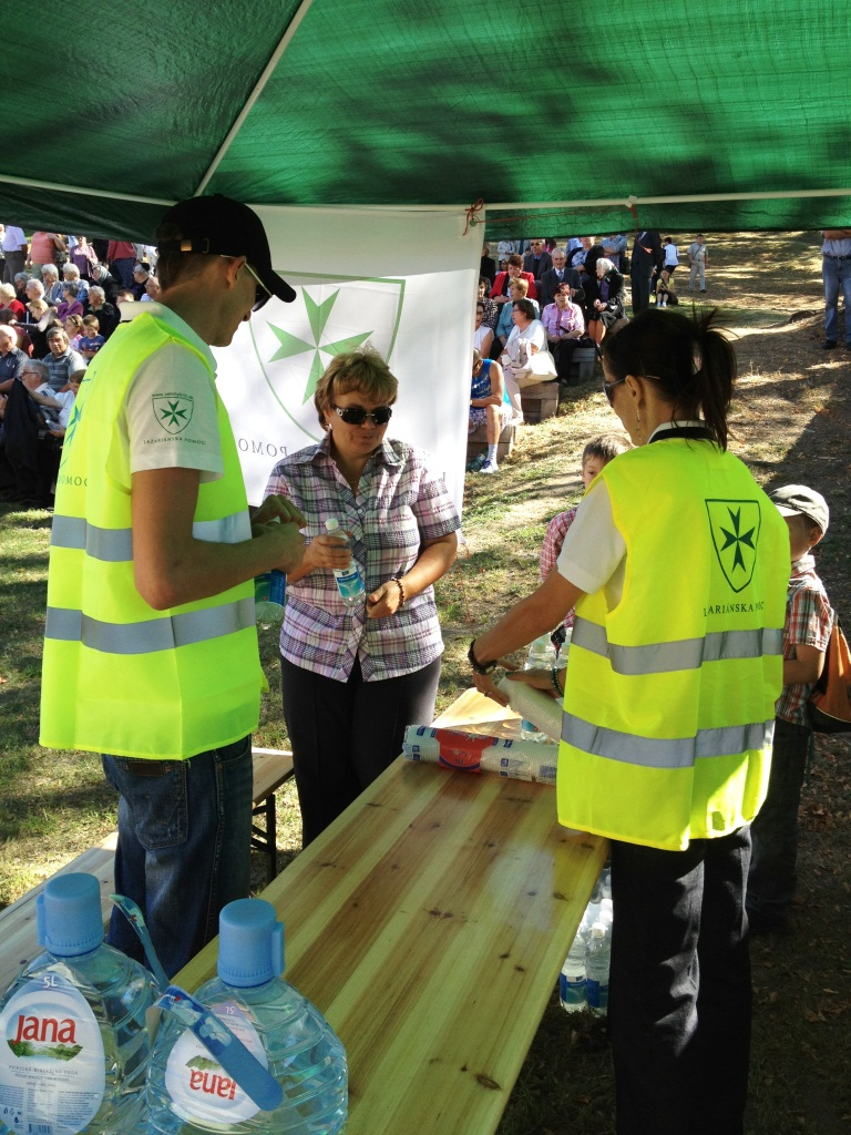 Lazariánska pomoc pri zásahu v Banskej Štiavnici, 2012